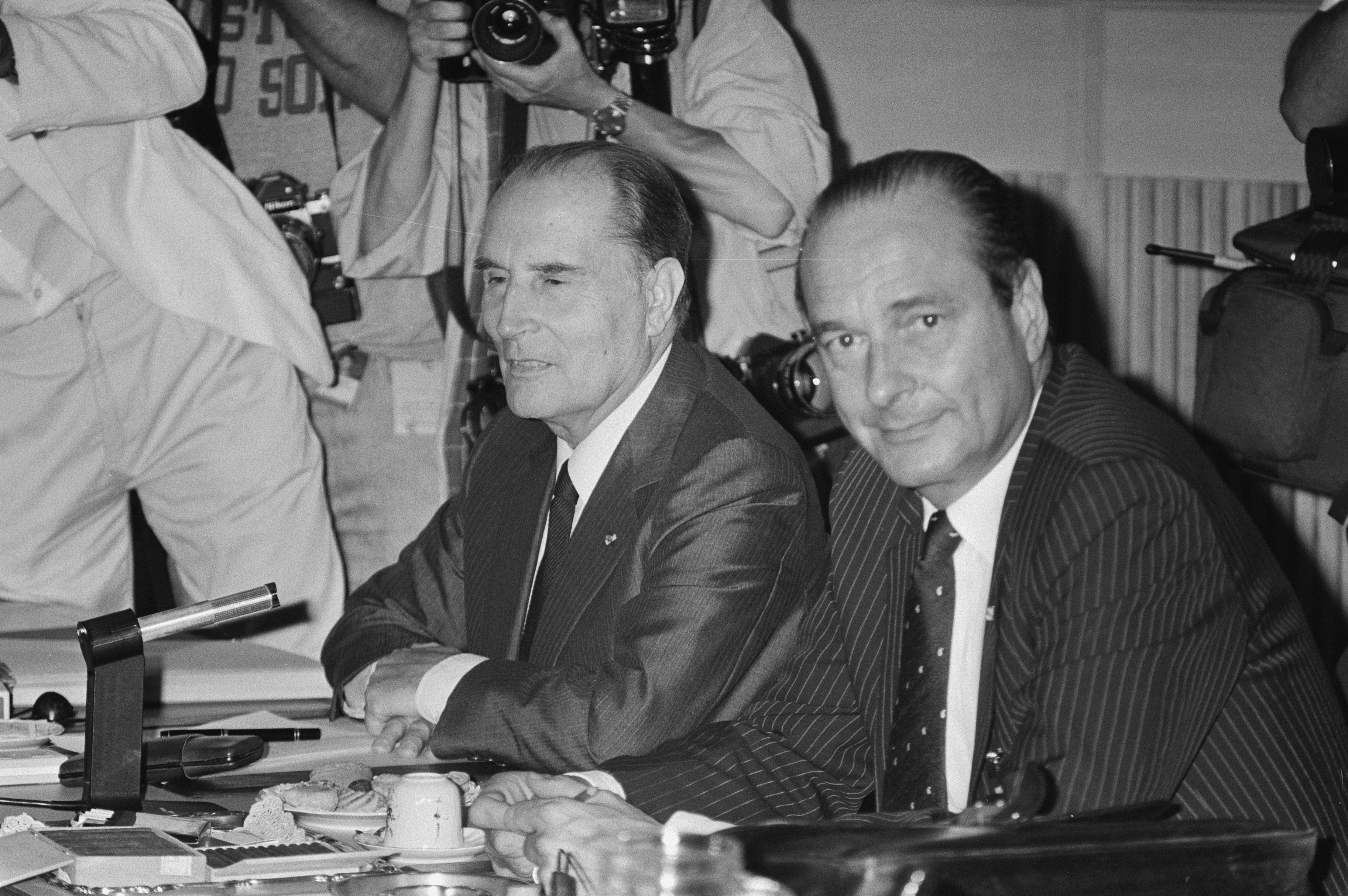 Collectie / Archief : Fotocollectie Anefo Reportage / Serie : [ onbekend ] Beschrijving : EEG-top in Den Haag : vergadering ministers van Buitenlandse Zaken ; vergadering regeringsleiders ( nr. 24 ) Datum : 26 juni 1986 Locatie : Den Haag, Zuid-Holland Trefwoorden : Vergaderingen, ministers Fotograaf : Molendijk, Bart / Anefo Auteursrechthebbende : Nationaal Archief Materiaalsoort : Negatief (zwart/wit) Nummer archiefinventaris : bekijk toegang 2.24.01.05 Bestanddeelnummer : 933-6981 Reacties Geplaatst door Maaike op 11 april 2013 - 12:36. Francois Mitterrand (links) president van Frankrijk en Jacques Chirac, premier van Frankrijk Persoonsnamen: Jacques Chirac; Francois Mitterand